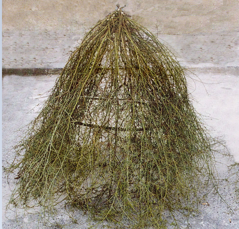 Modello di "spalas", creata con arbusti di ginestra selvatica, come ex voto da indossare a torso nudo durante la processione di san Rocco a Palmi.